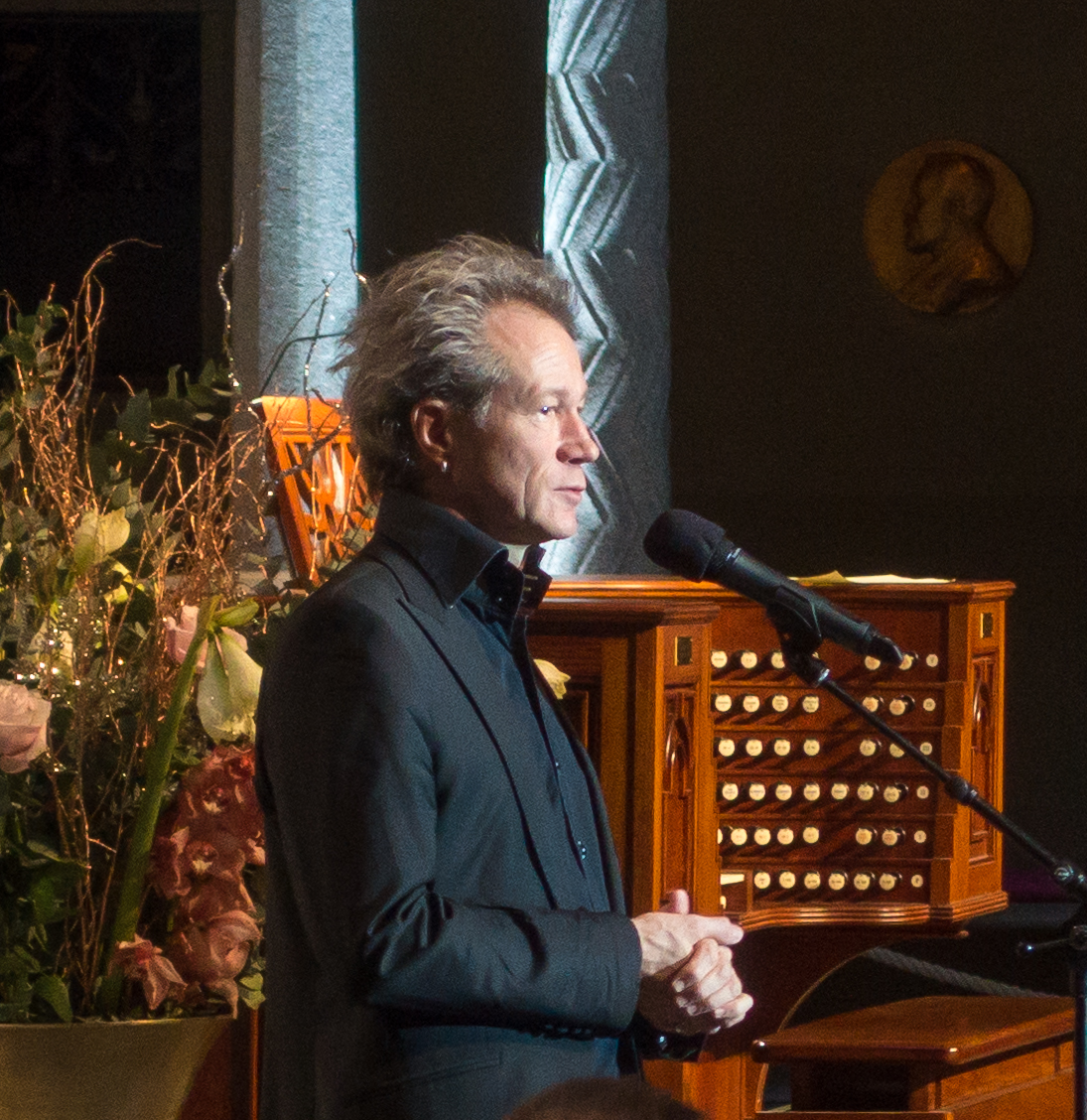 Nyårskonsert med nya stadshusorgeln i Stockholms stadshus den 1 januari 2020. Kompositören och organisten Gunnar Idenstam medverkar.